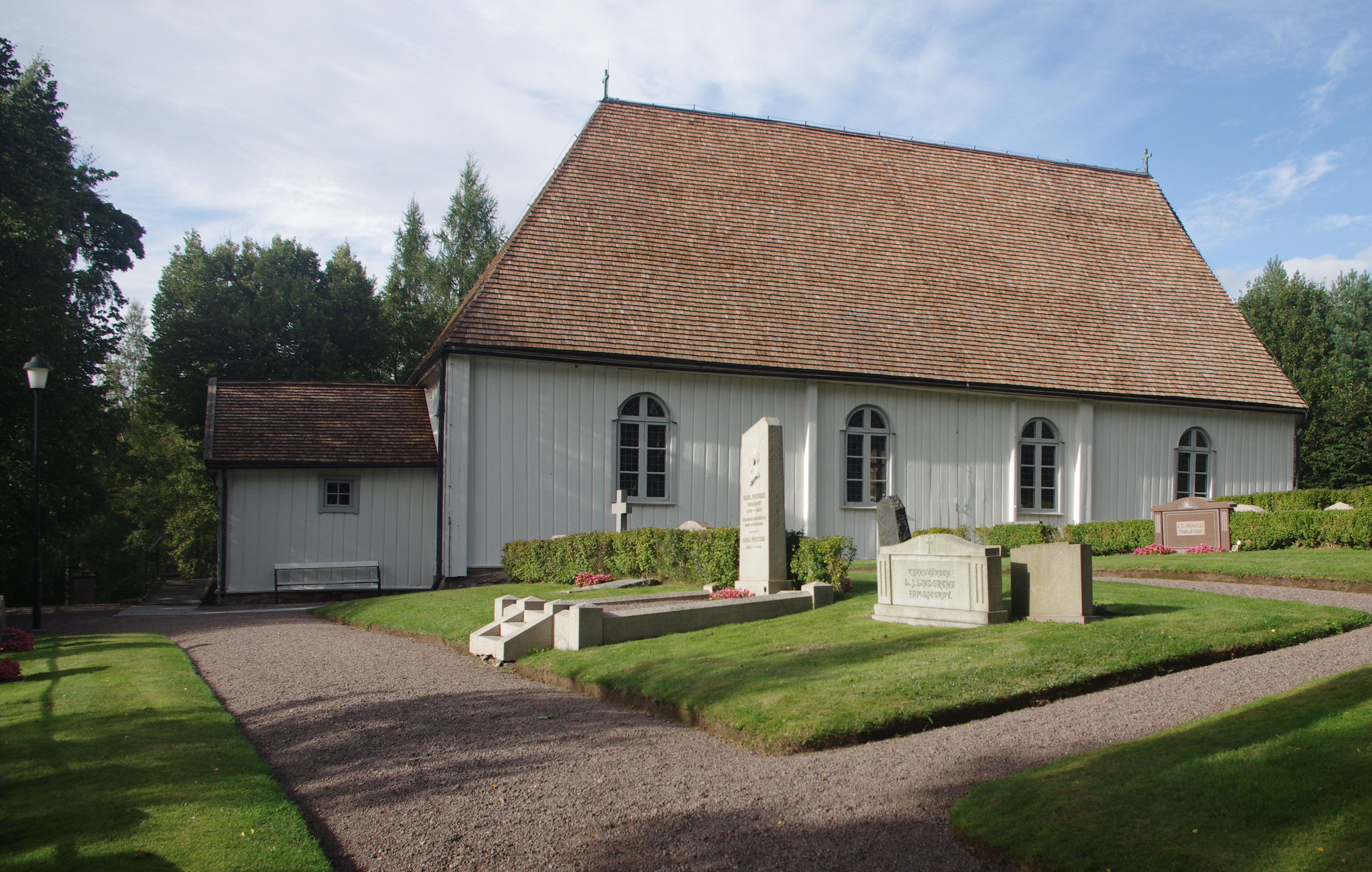 Korsberga kyrka i Korsberga socken i Västergötland och Hjo kommun i Västragötalands län i Sverige.